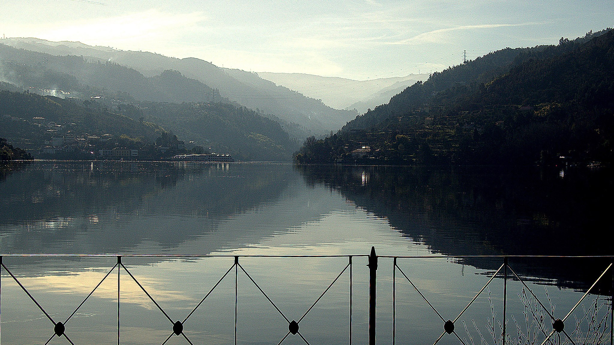 Visita de um grupo de Amigos da Portografia, a Baião, em 09/02/2013